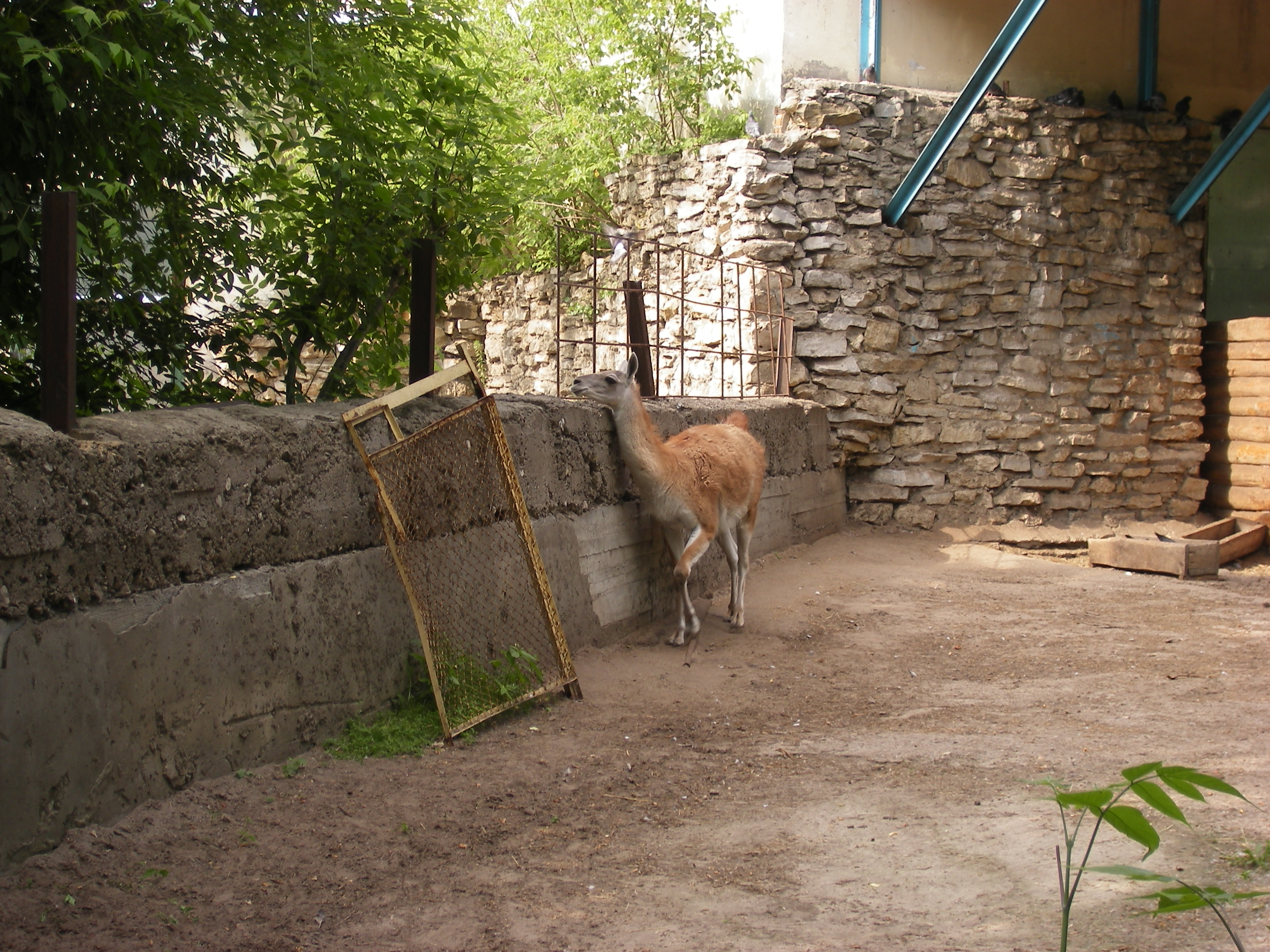 Lama / Лама